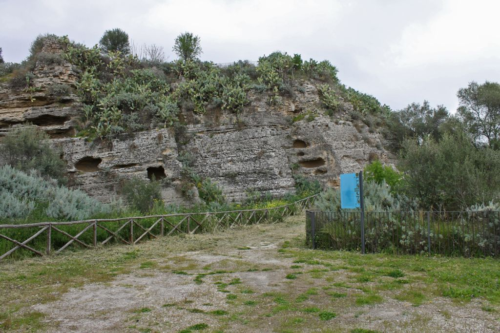 Poco distante dal centro abitato possiamo ammirare i ruderi del castellaccio( castrum vetus), costruito seguendo il disegno della sommità piatta della rupe su cui poggia. Le prime informazioni riguardanti il castello medievale risalgono all'epoca normanna.